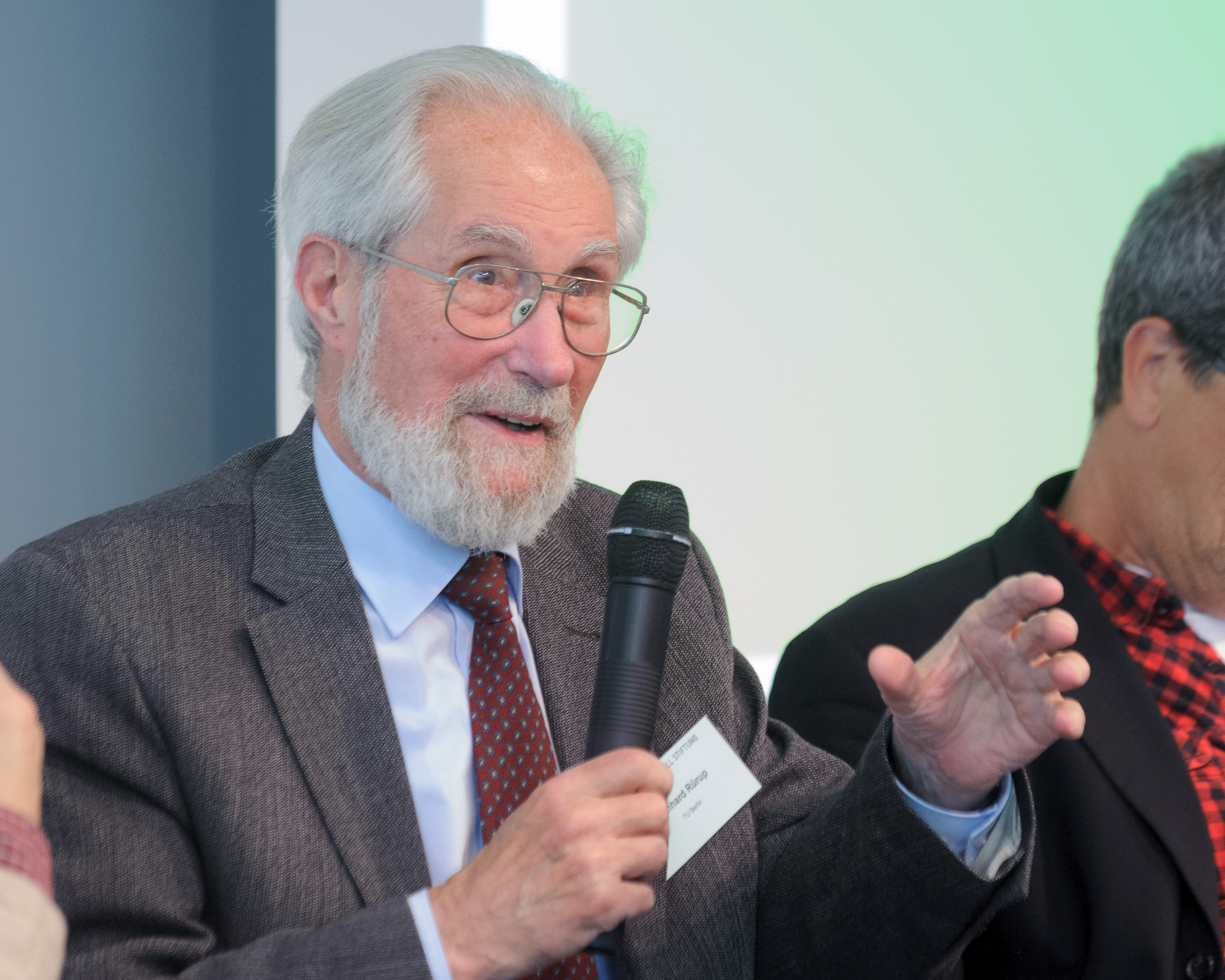 Prof. em. Dr. Reinhard Rürup (Professor für Neuere Geschichte an der TU Berlin, von 1989 bis 2004 Leiter der Gedenkstätte Topographie des Terrors in Berlin) 1848 und Europa Foto: Stephan Röhl (